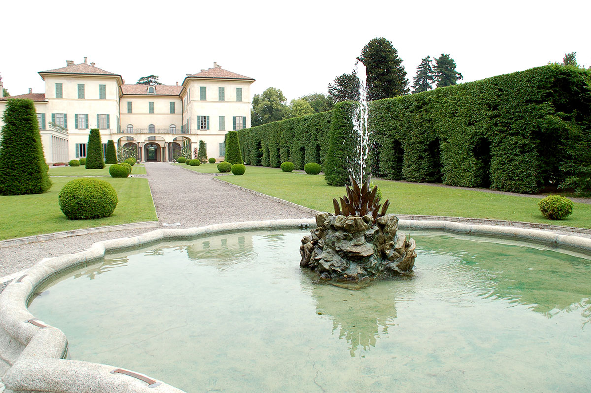 Villa Panza in Varese, Italy